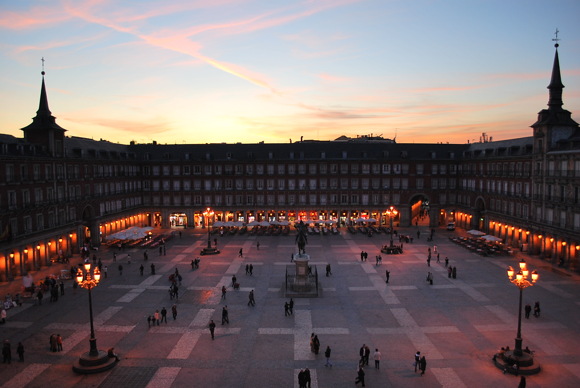 Sonnenuntergang am Plaza Mayor in Madrid